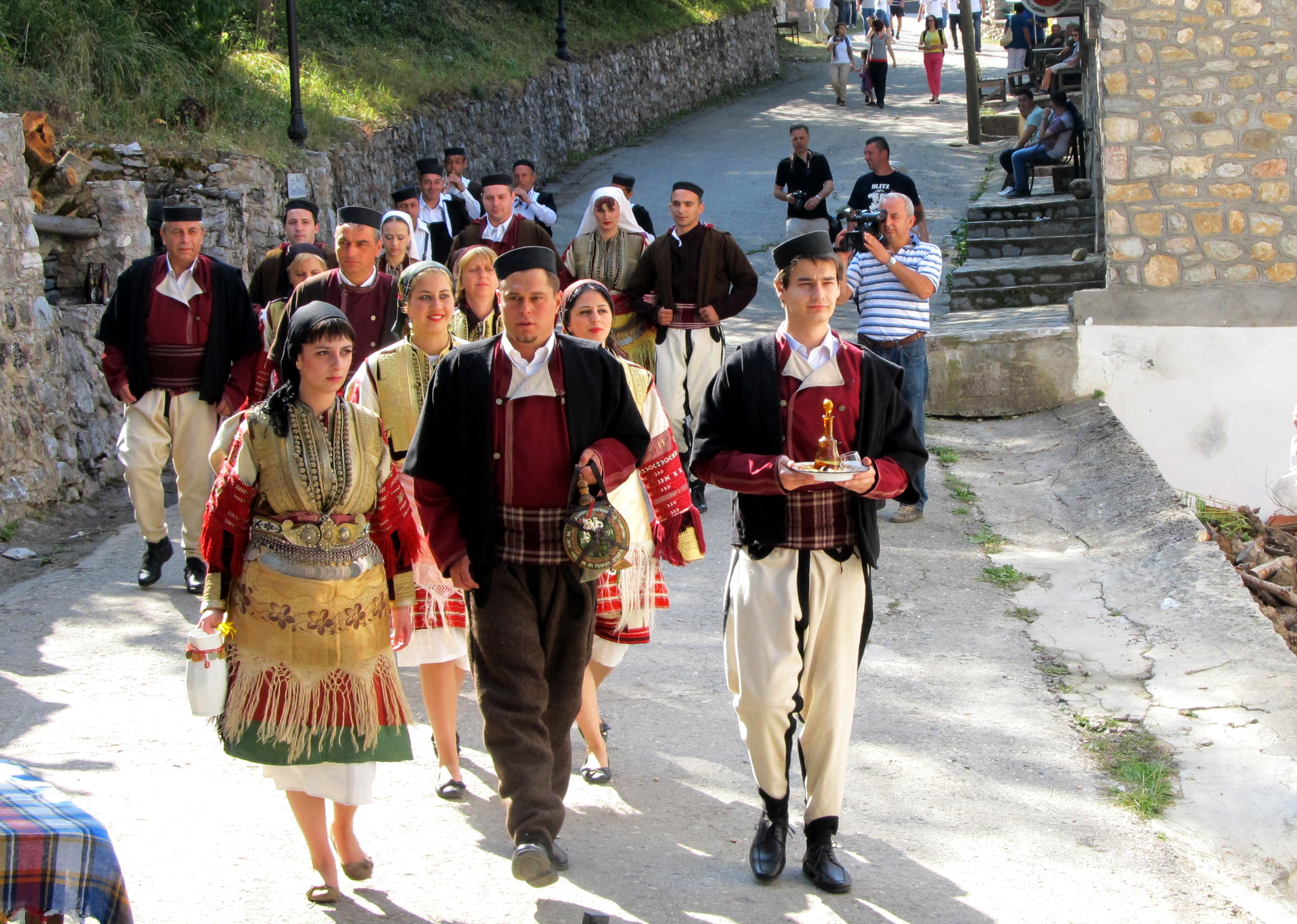 Сликата покажува одење на гробишта за да се поканат мртвите роднини на свадба